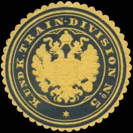 Sealing stamp Title: K. und K. Train-Division No. 5 Description: gelb, schwarz, geprägt Place: size: 4 cm